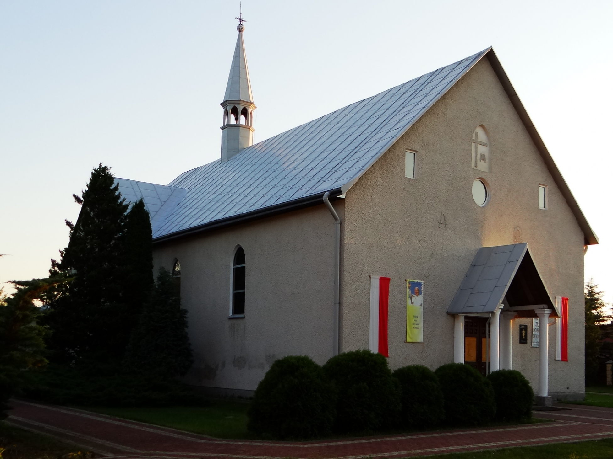 Zdjęcie wykonane w miejscowości Kopki, powiat niżański.